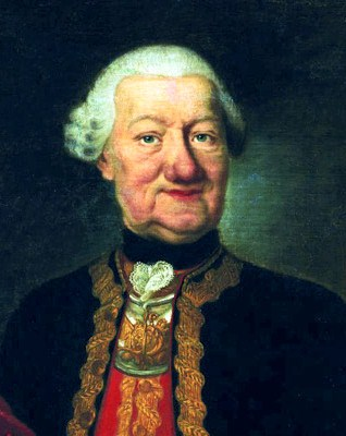 Johann Conrad Schlaun